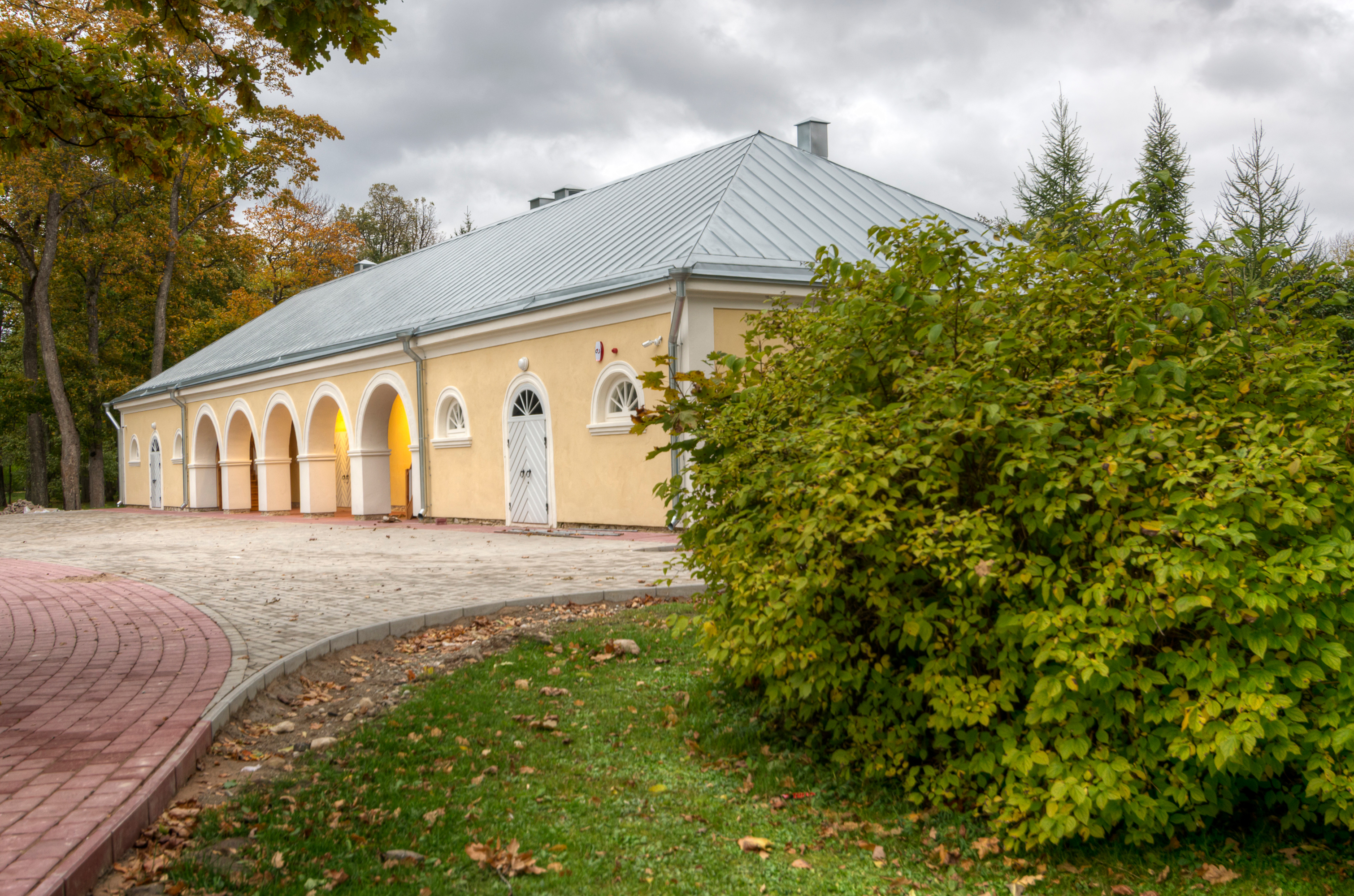 Mäetaguse mõisa ait